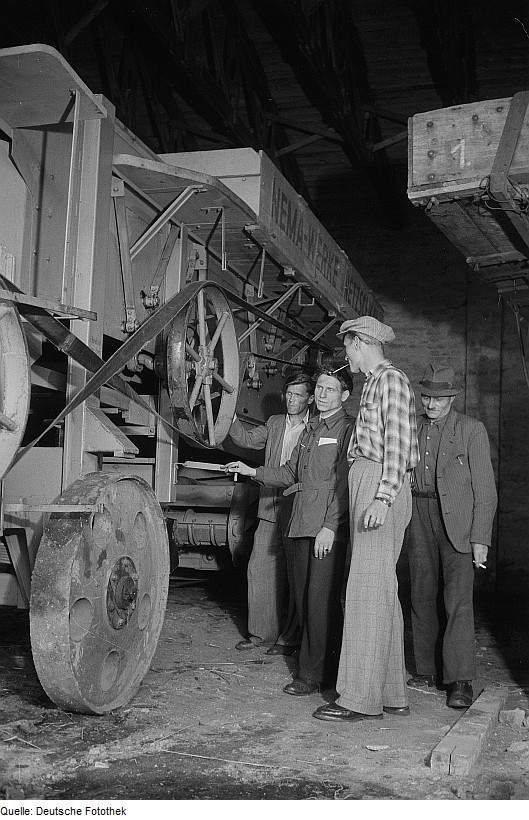 Original image description from the Deutsche FotothekEinweisung in die Technik einer landwirtschaftlichen Maschine